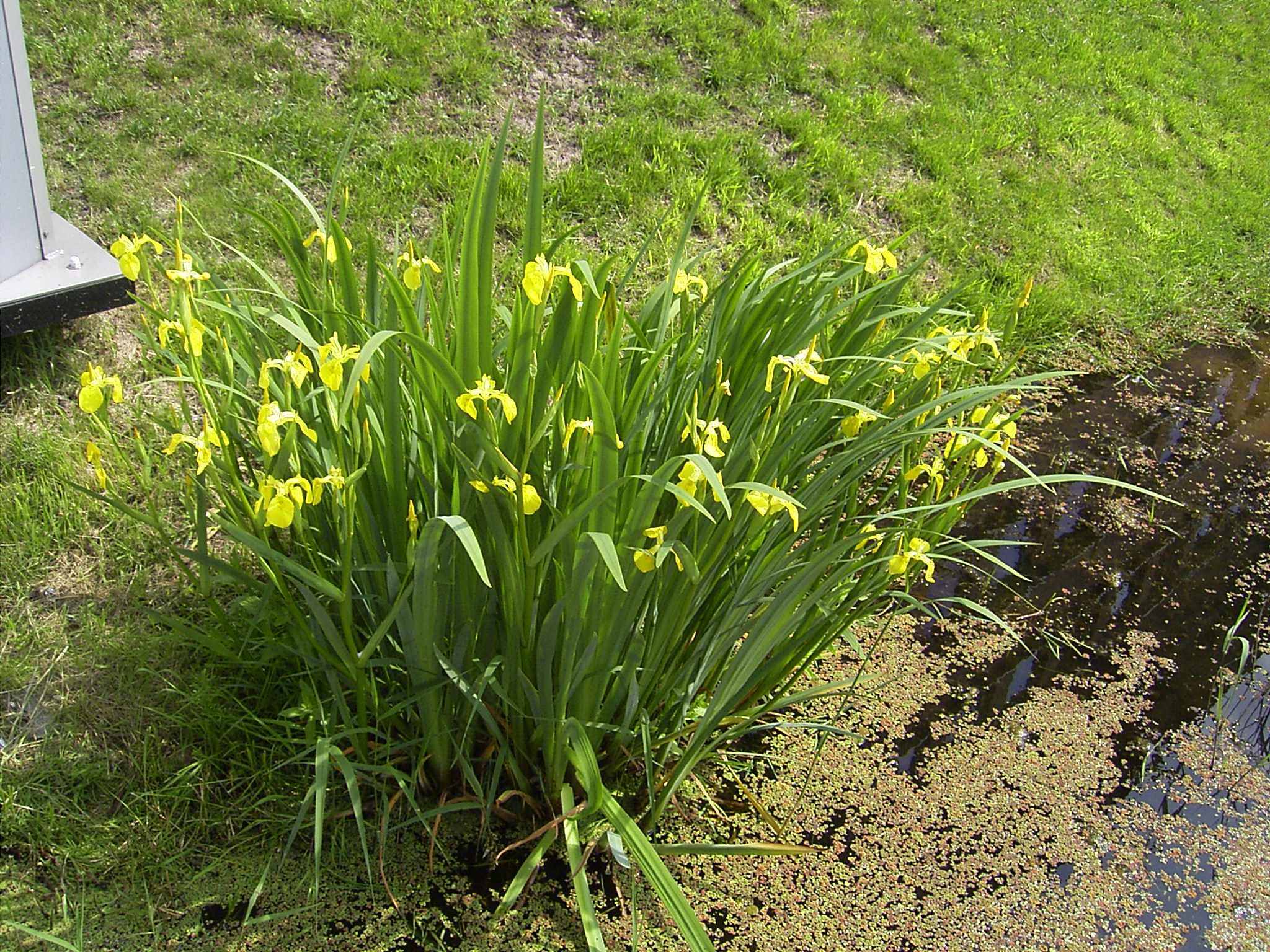 Gouda, bedrijventerrein goudse poort, 17-5-2004